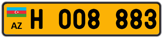 Azərbaycan Respublikası avtomobil dövlət qeydiyyat nişanı - Xarici Vətəndaşlar